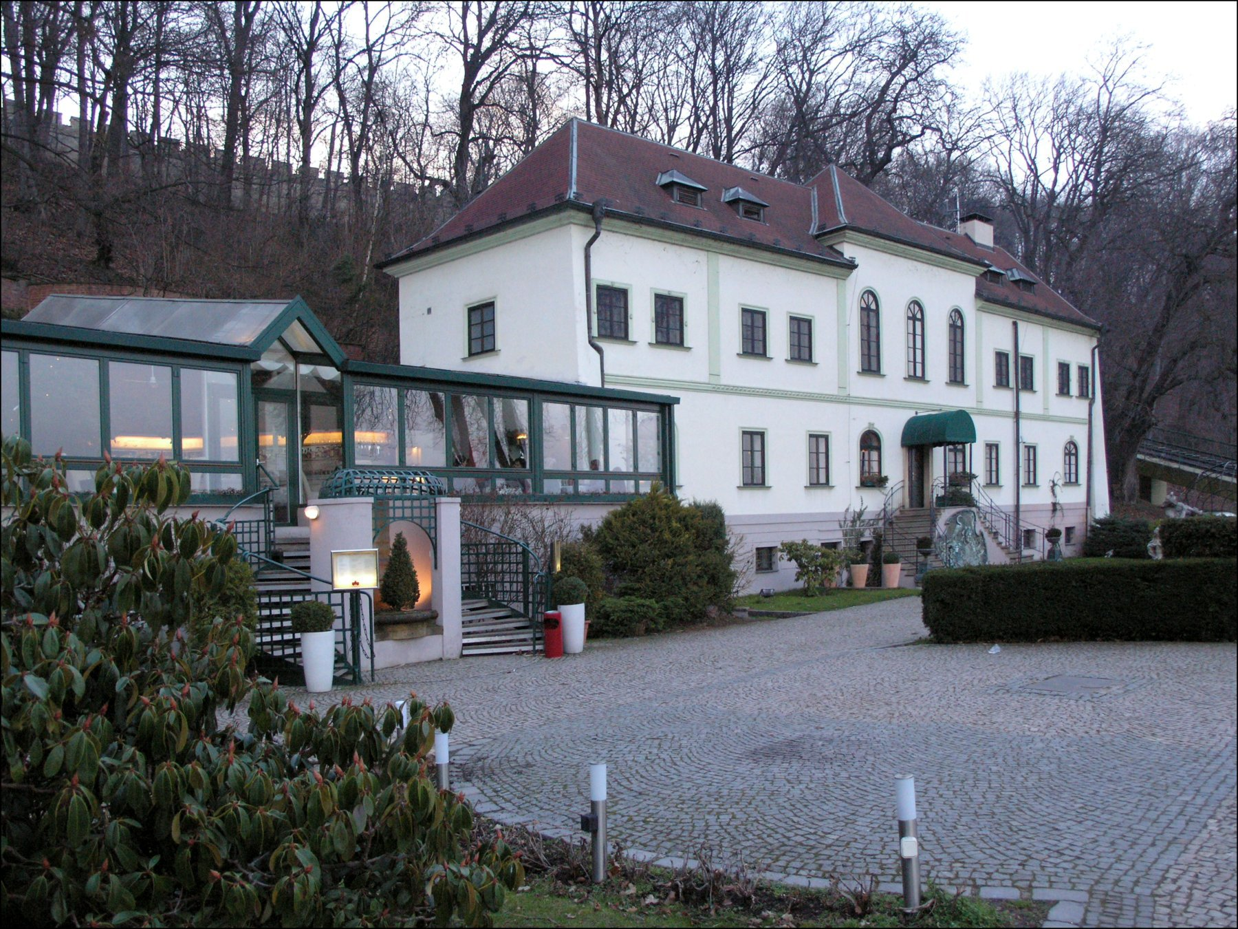 Petřín